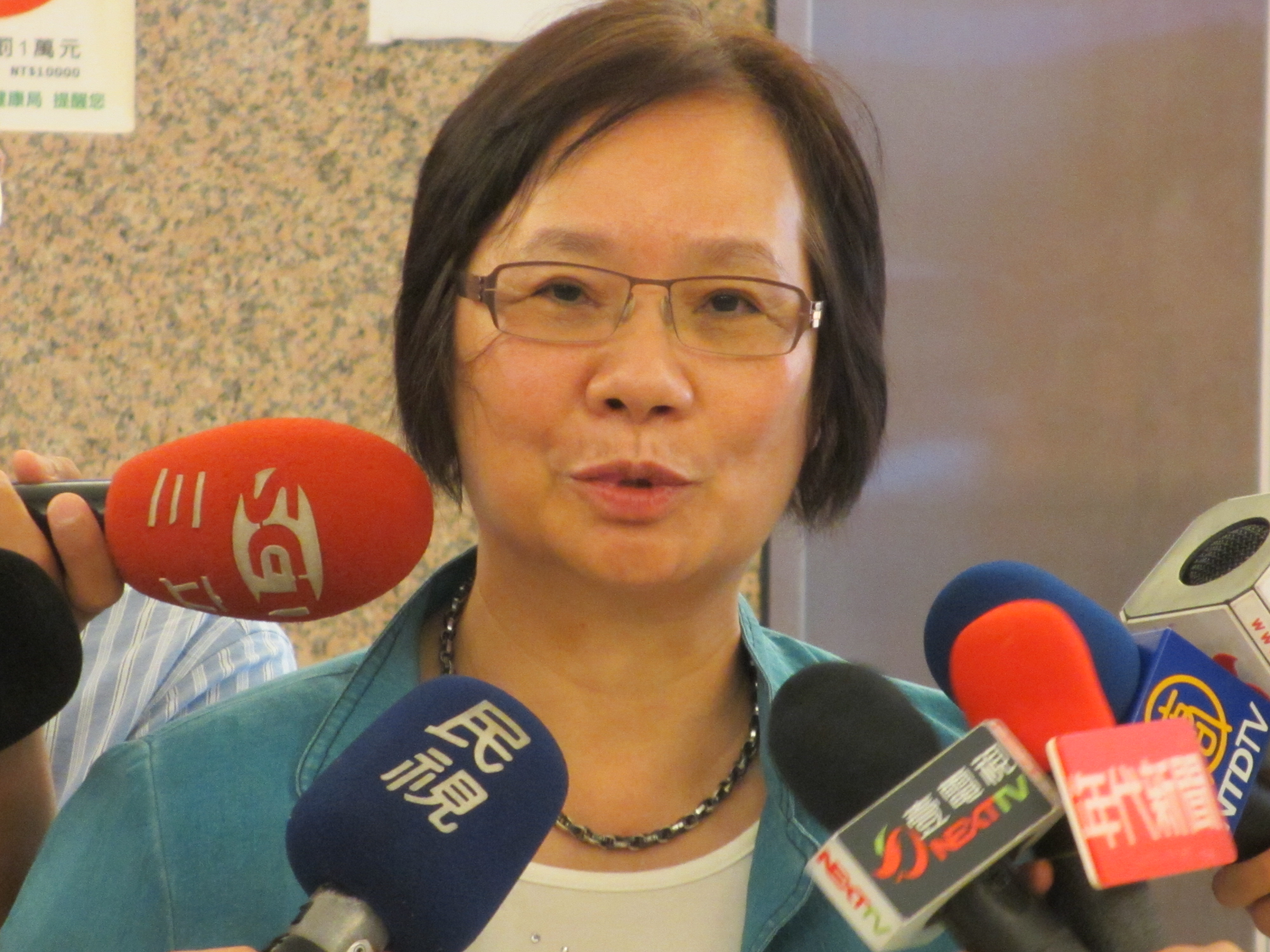 中國國民黨籍立法委員羅淑蕾。